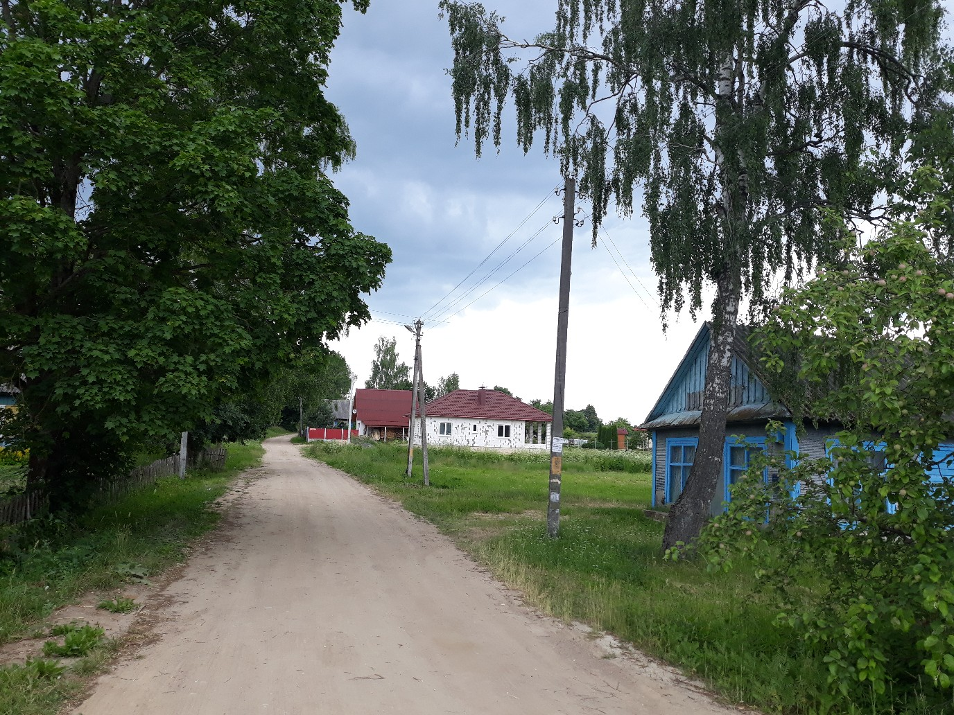 вёска ўлетку 2018